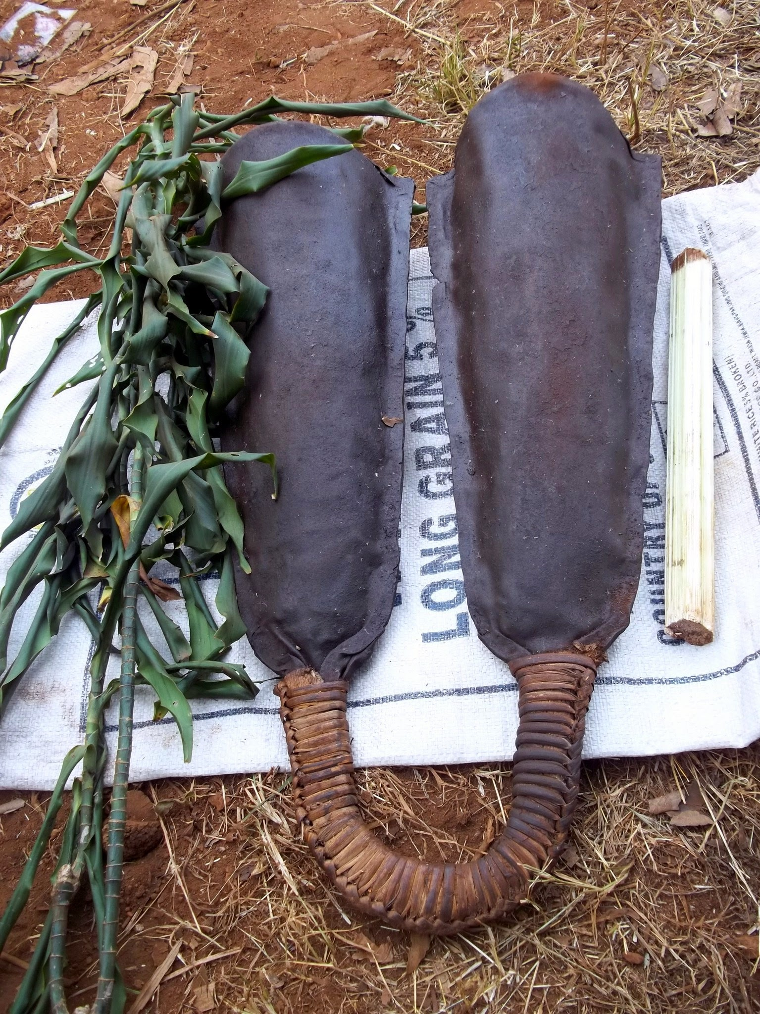 Un instrument de musique traditionnel à Bamougong